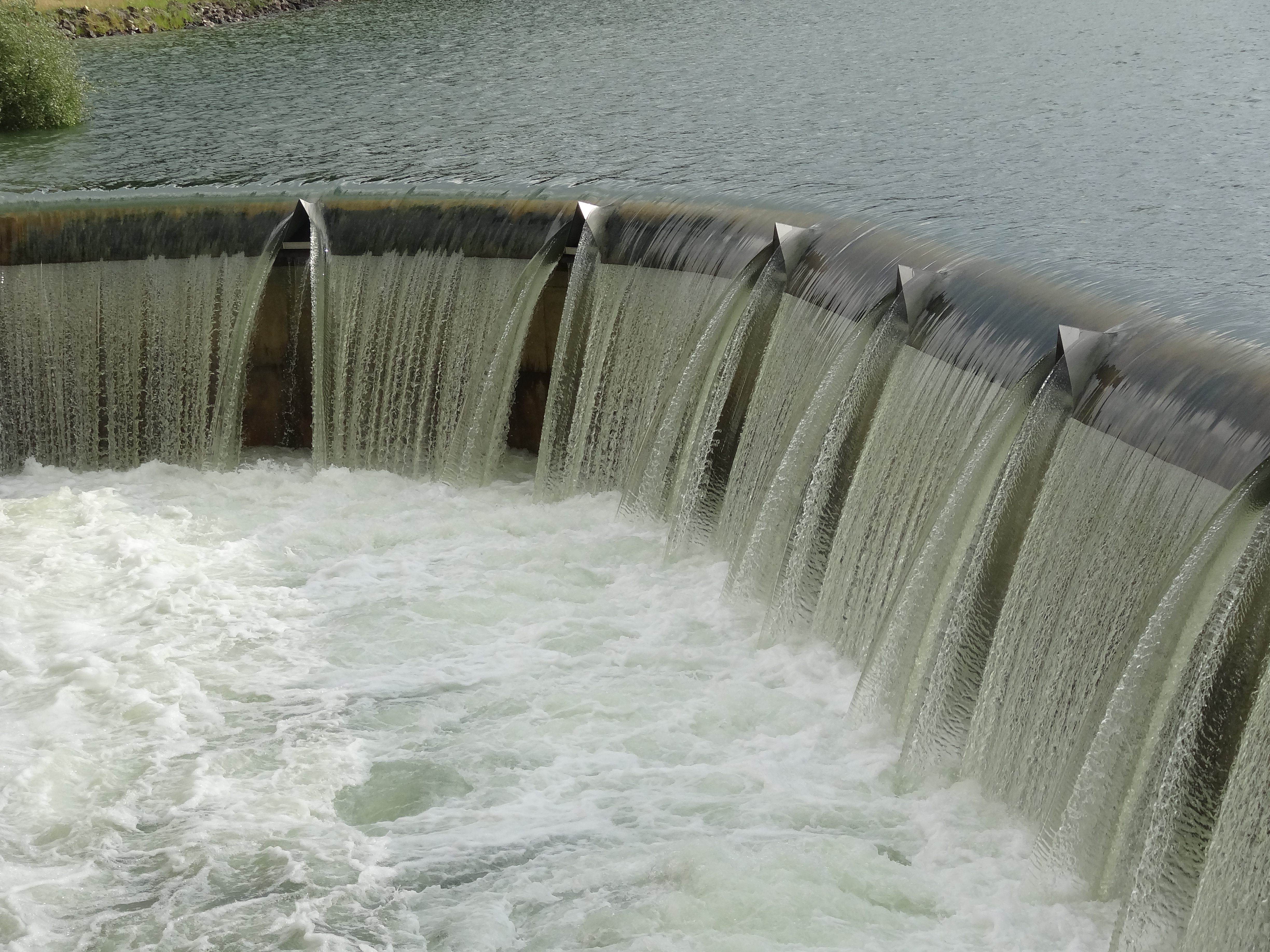 Le déversoir du Lac de la Gimone, lors des crues du 30 mai 2013 et 31 mai 2013